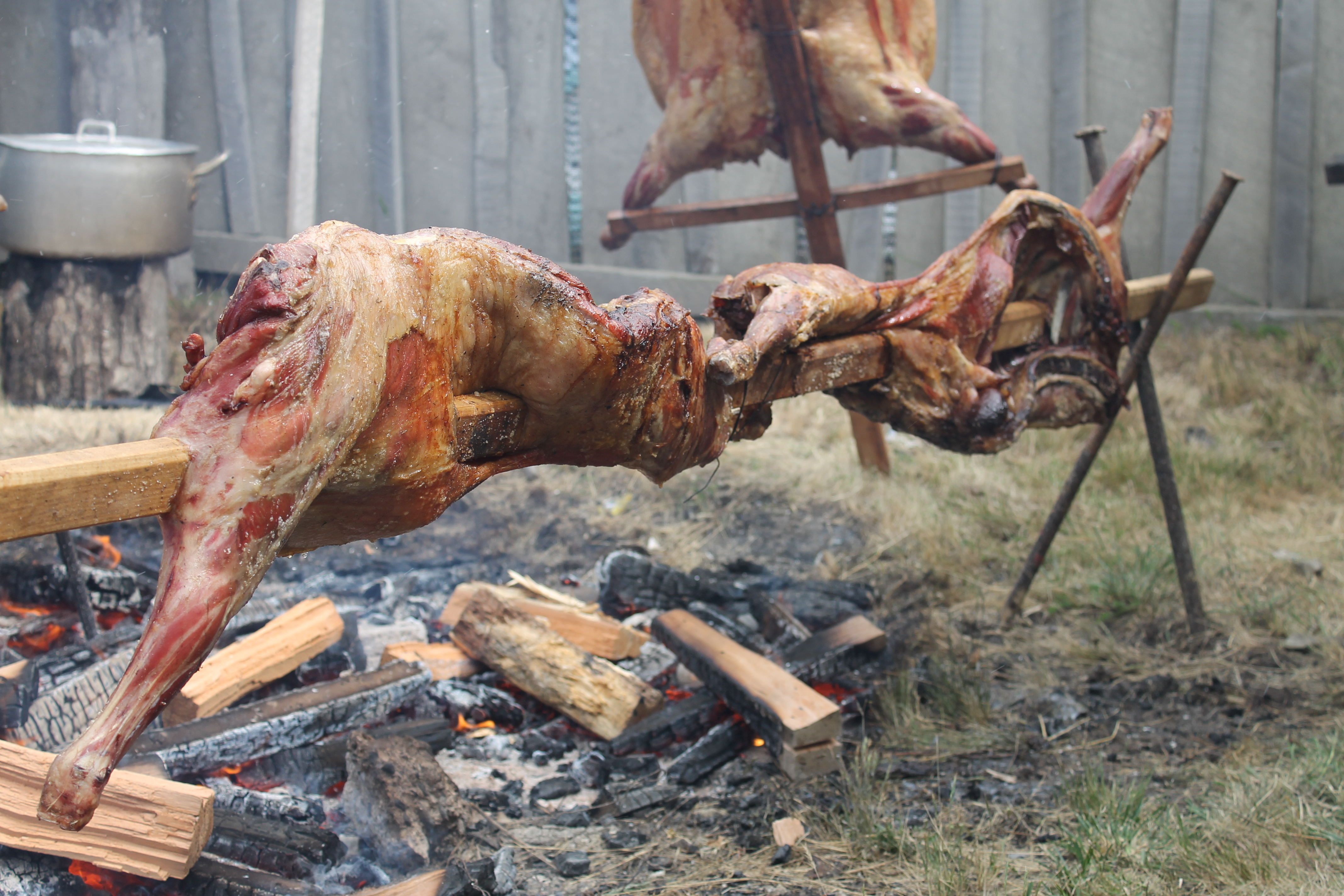 Asado en Tierra del Fuego - Fotografia hecha durante la fiesta Asado Internacional Mas grande de Tierra del Fuego, en Porvenir, Región de Magallanes, Chile